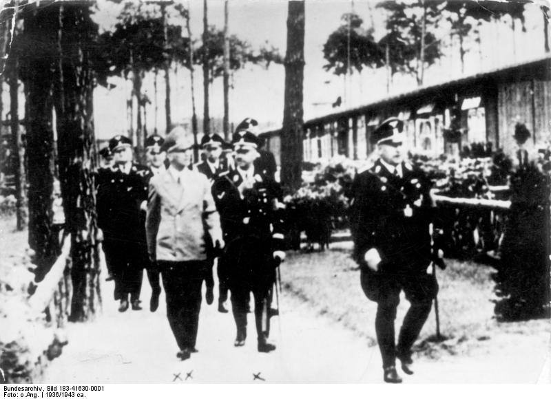 Zentralbild 25.9.1956 Himmler und Frick im KZ Sachsenhausen. - Reichsinnenminister Wilhelm Frick (links), Mitglied des Ministerrats und sein Stellvertreter in dieser Stellung der Reichsführer SS und Chef der deutschen Polizei im Reichsministerium des Innern Heinrich Himmler (neben ihm) besichtigen das Konzentrationslager Sachsenhausen bei Oranienburg. (Das Bild wurde bei Heinz Baumkötter, geboren 1912 in Burgsteinfurt in Westfalen gefunden.)